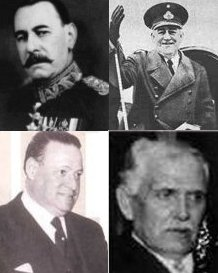 Los cuatro presidentes argentinos entre 1930 y 1943. De arriba-abajo: José Félix Uriburu (1930-1932), Agustín P. Justo (1932-1938), Roberto Ortiz (1938-1942), Ramón Castillo (1942-1943).